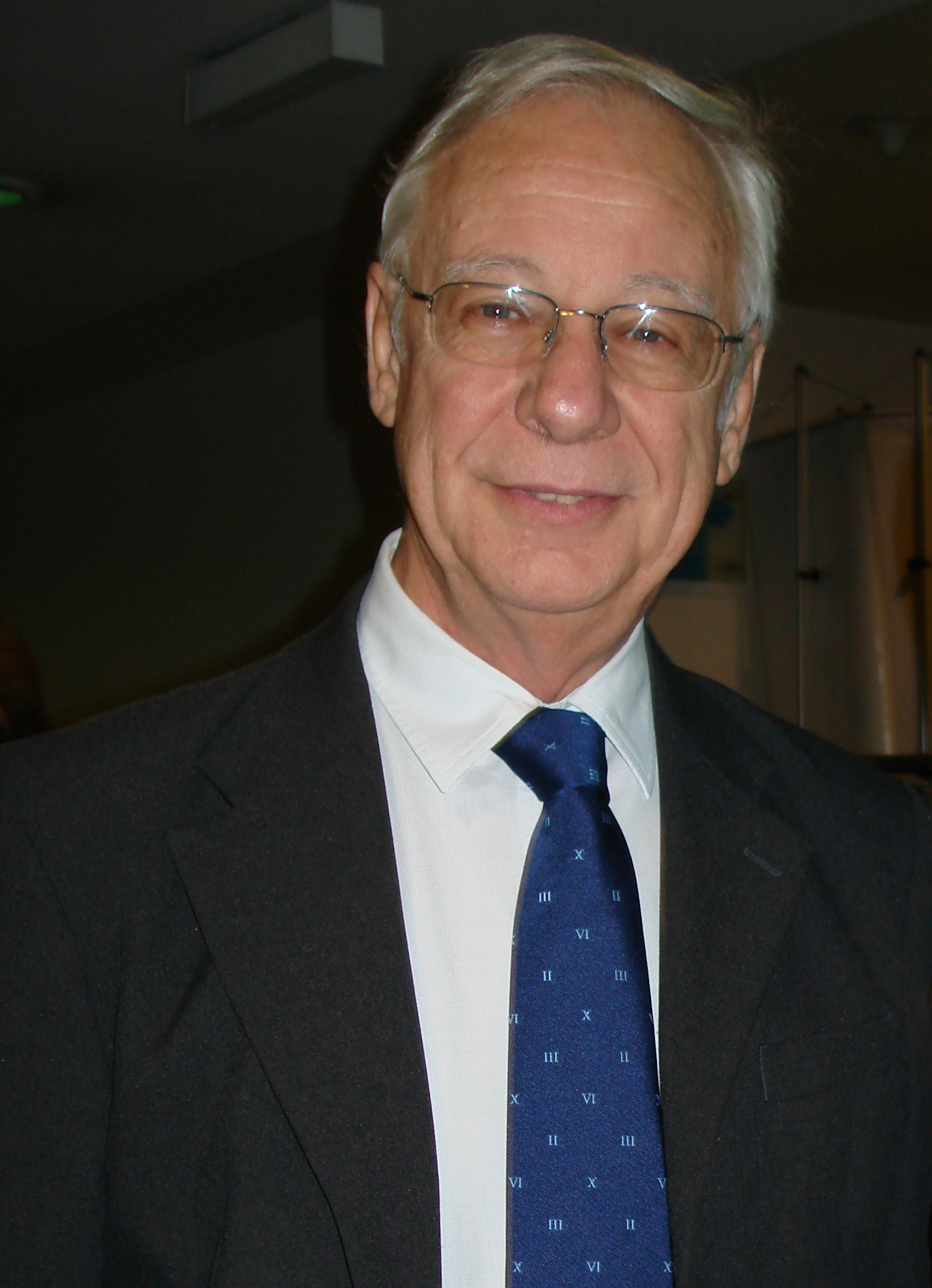 Jose Joaquín Brunner.